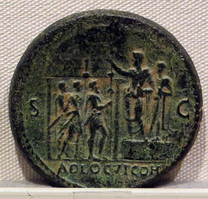 Palazzo Massimo alle Terme